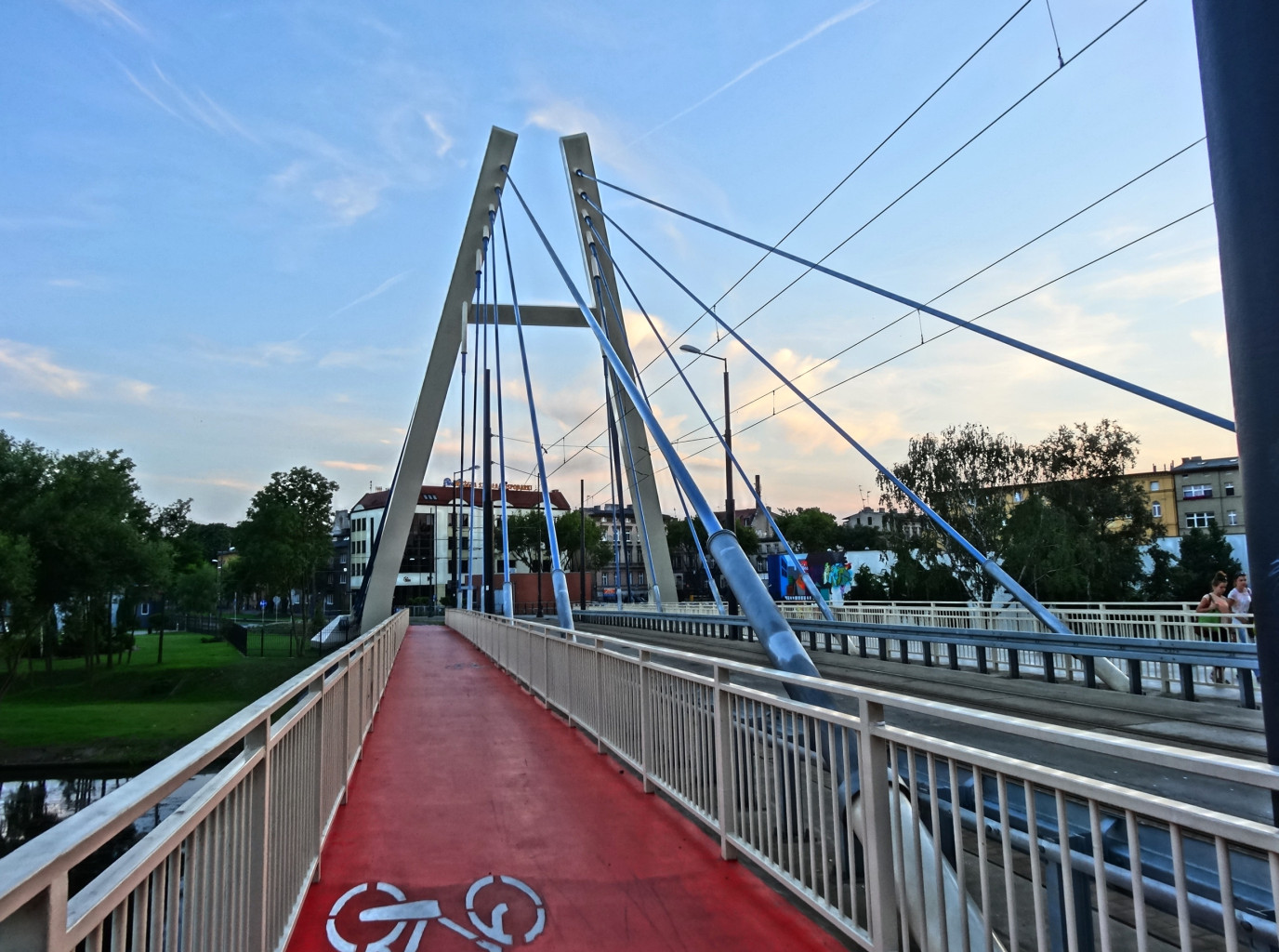 Most tramwajowy im. Władysława Jagiełły nad Brdą w Bydgoszczy